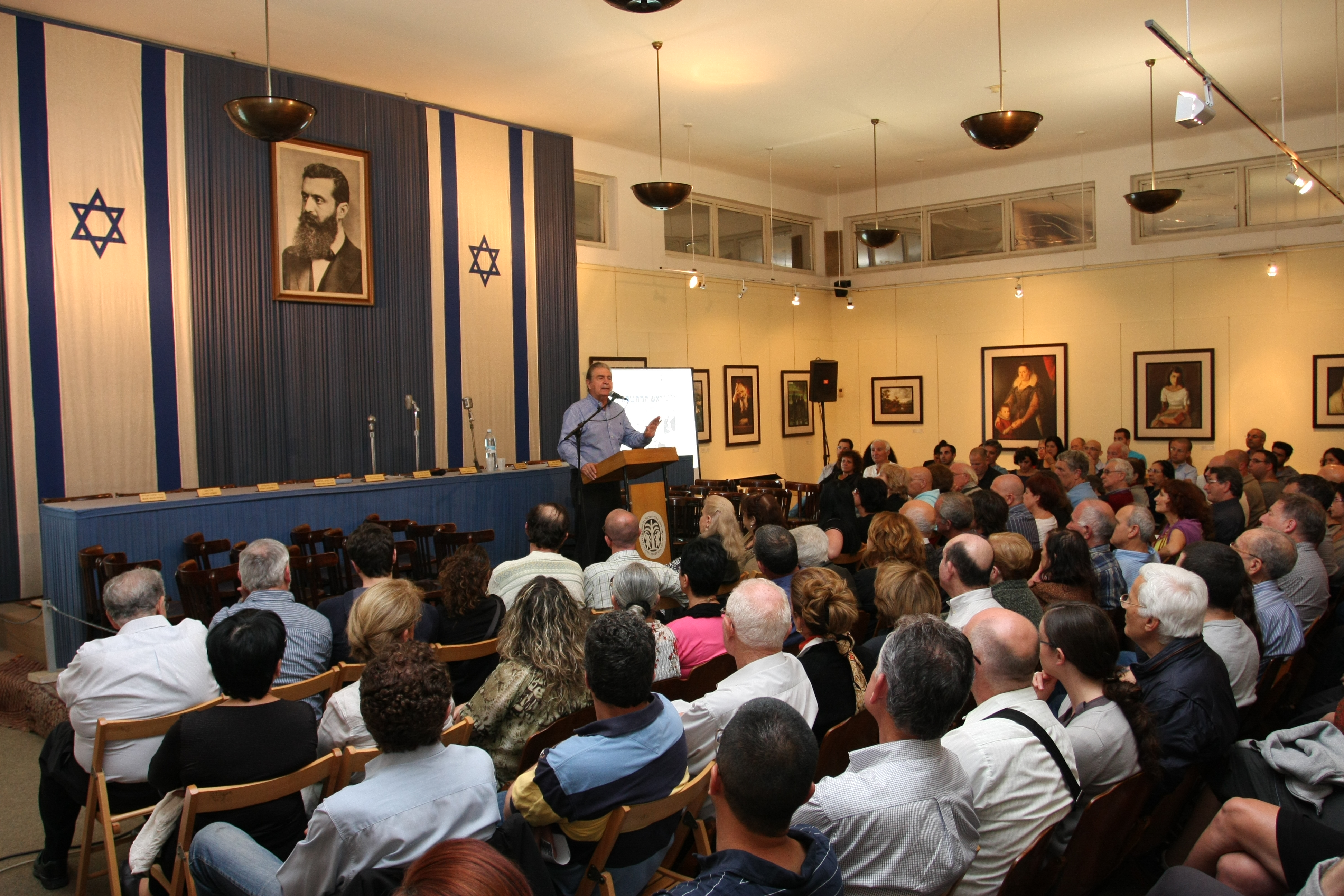 בית העצמאות הוא המקום בו נערך טקס הכרזת העצמאות של מדינת ישראל. בית העצמאות, ביתם של צינה ומאיר דיזינגוף, מבתיה הראשונים של תל אביב. הבית שנבנה בשנת 1910 על ידי מאיר דיזנגוף ונבחר לארח את טקס הכרזת המדינה בשנת 1948 וכיום הוא משמש מוזיאון היסטורי לתולדות ההכרזה ההיא, תחת השם בית העצמאות. המסע מתחיל עם הרצל, עובר דרך הקמת תל-אביב ופועלו של דיזנגוף, ומסתיים באולם הכרזת העצמאות, עם שחזור מלא של ההודעה המרגשת בקולו של בן גוריון.